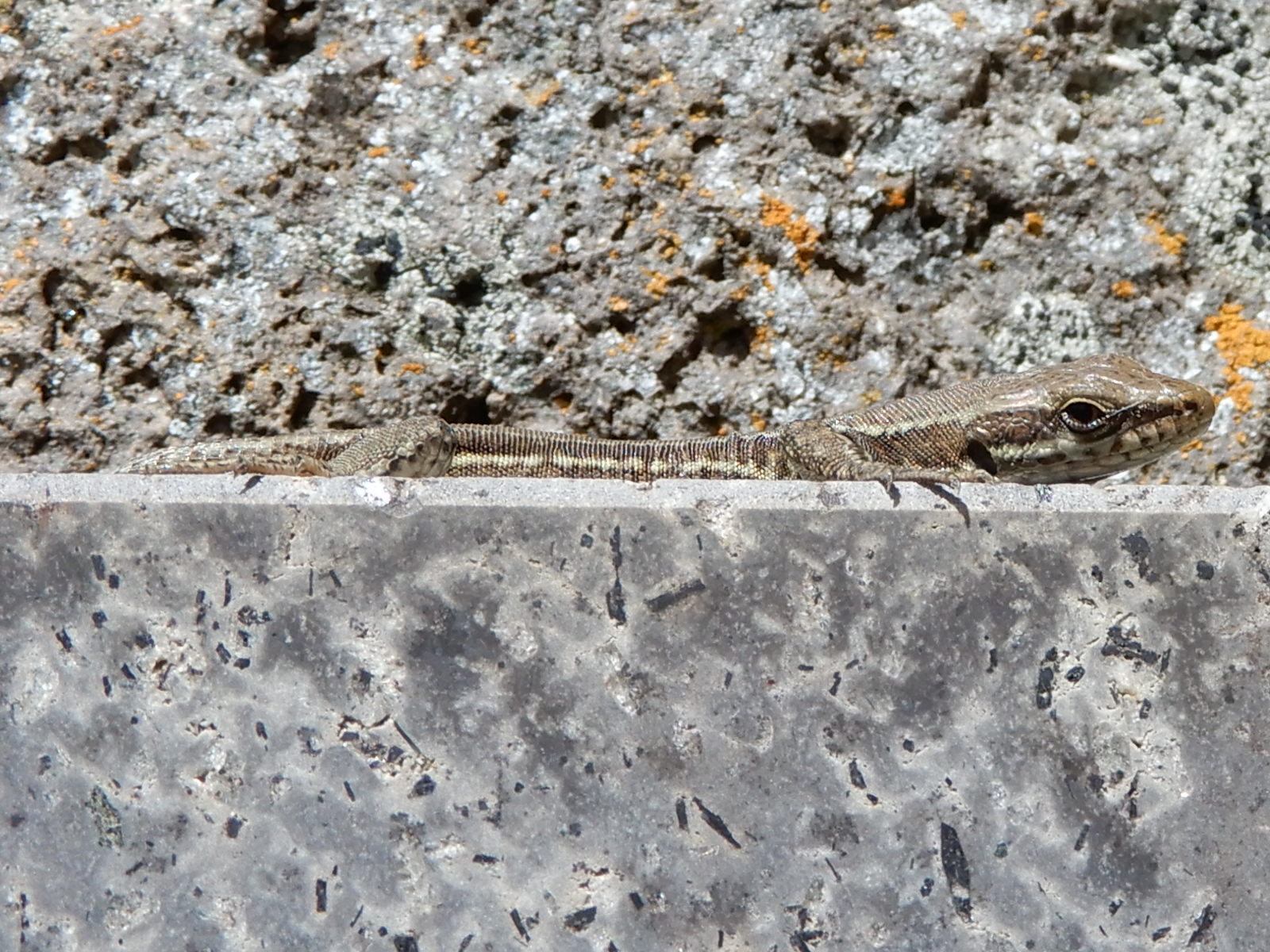 Lézard des murailles sur une dalle de marbre et devant un mur de pierre, près de l'église romane de Bredons, dans le Cantal.